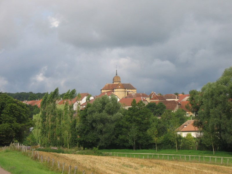 Vue générale de Montigny-lès-Cherlieu, depuis le carrefour route de Cherlieu-route d'Agneaucourt.